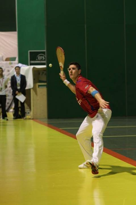 seleccion